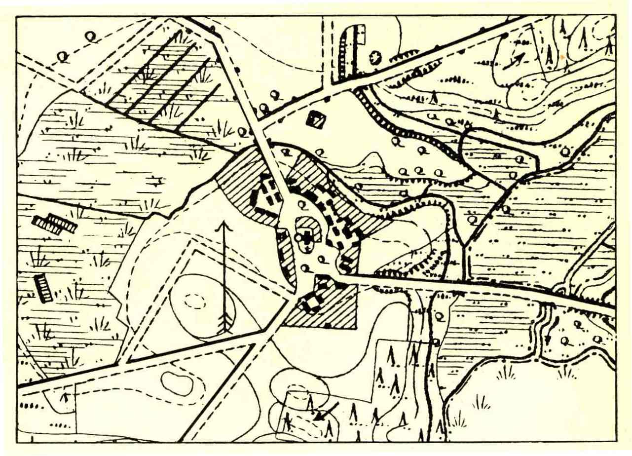 Dorfplan von Bork, Ortsteil der Stadt Kyritz, Landkreis Ostprignitz-Ruppin, Brandenburg (aus Georg Büttner (Schriftl.), Paul Eichholz (Bearb.):'Die Kunstdenkmäler des Kreises Ostprignitz. LI, 312 S.Berlin, Voss, 1907 (Die Kunstdenkmäler der Provinz Brandenburg, hrsg. vom Brandenburgischen Provinzialverbande, Bd. 1, T. 2)., S.12, Abb.14